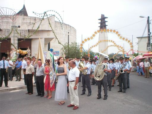 Procissão na Bidoeira de Cima, Leiria